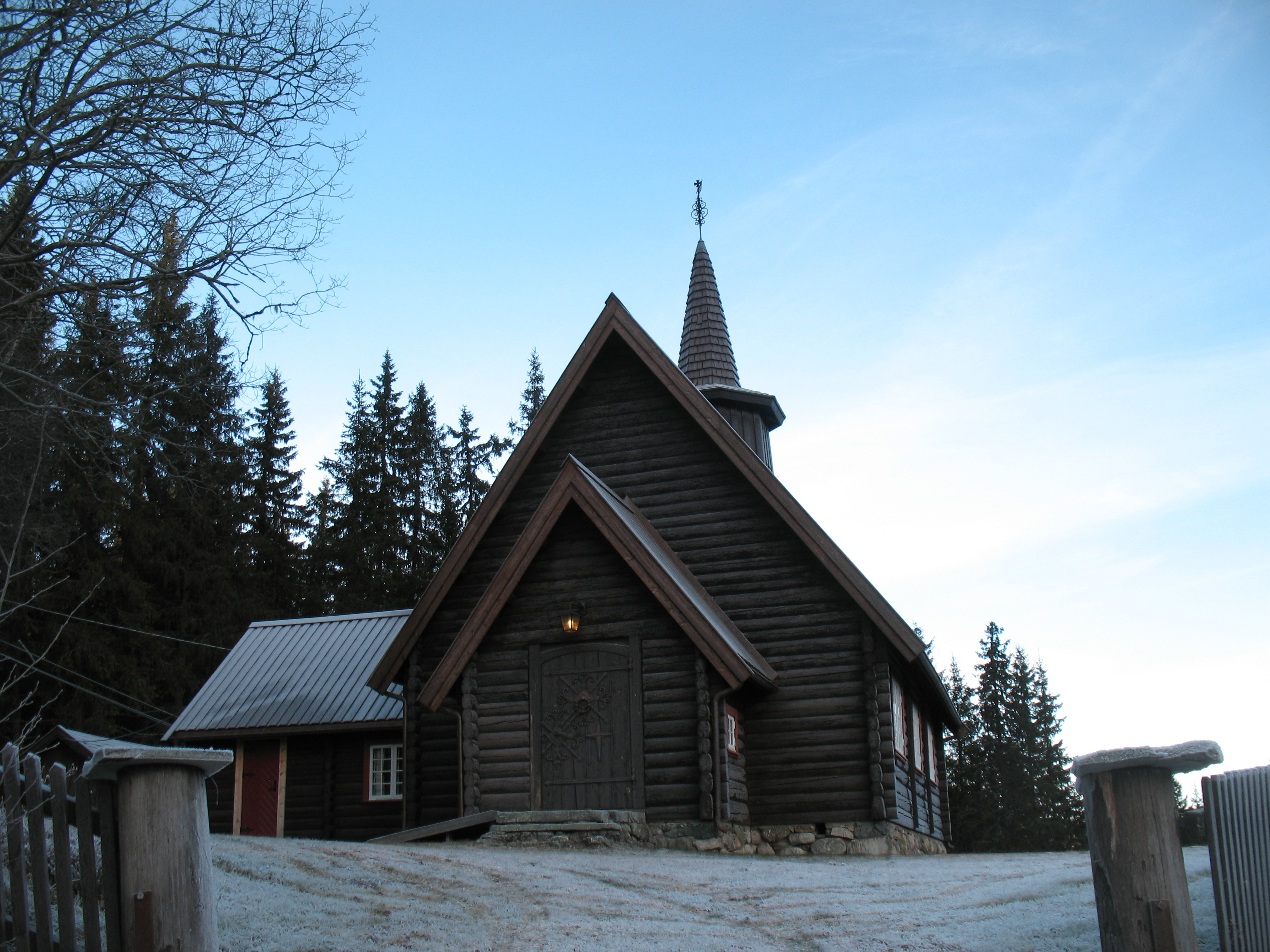 Mandal kapell i Seljord kommune i Telemark., Agder og Telemark bispedømme; Vest-Telemark prosti. Lafta langkyrkje bygd etter donasjon frå Ole Bringen som i 1863 utvandra til Amerika. Byggeår 1954. Frå vest.